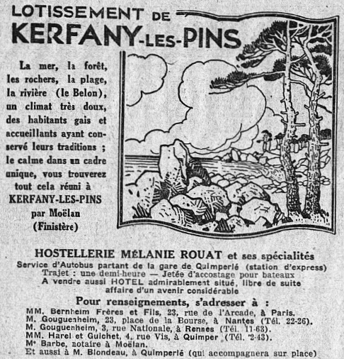 Publicité concernant le lotissement touristique de Kerfany-les-Pins publiée dans le journal L'Intransigeant 'n 1926.